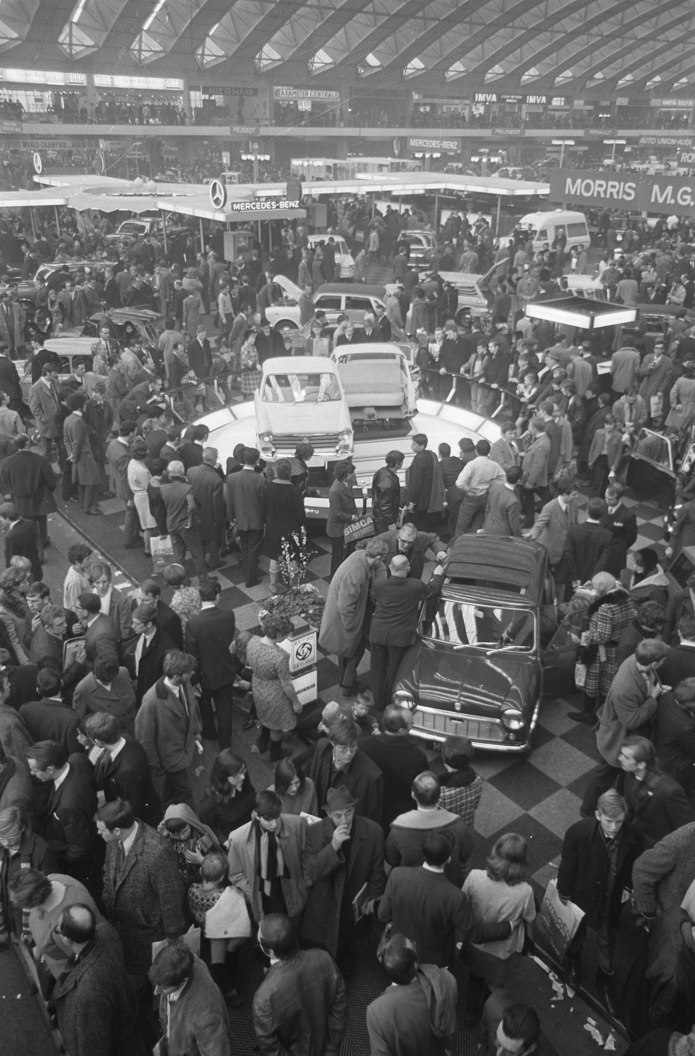 Collectie / Archief : Fotocollectie Anefo Reportage / Serie : [ onbekend ] Beschrijving : Drukte op de auto-tentoonstelling in de RAI Datum : 16 februari 1969 Locatie : Amsterdam, Noord-Holland Trefwoorden : tentoonstellingen Instellingsnaam : RAI Fotograaf : Nijs, Jac. de / Anefo Auteursrechthebbende : Nationaal Archief Materiaalsoort : Negatief (zwart/wit) Nummer archiefinventaris : bekijk toegang 2.24.01.05 Bestanddeelnummer : 922-1071